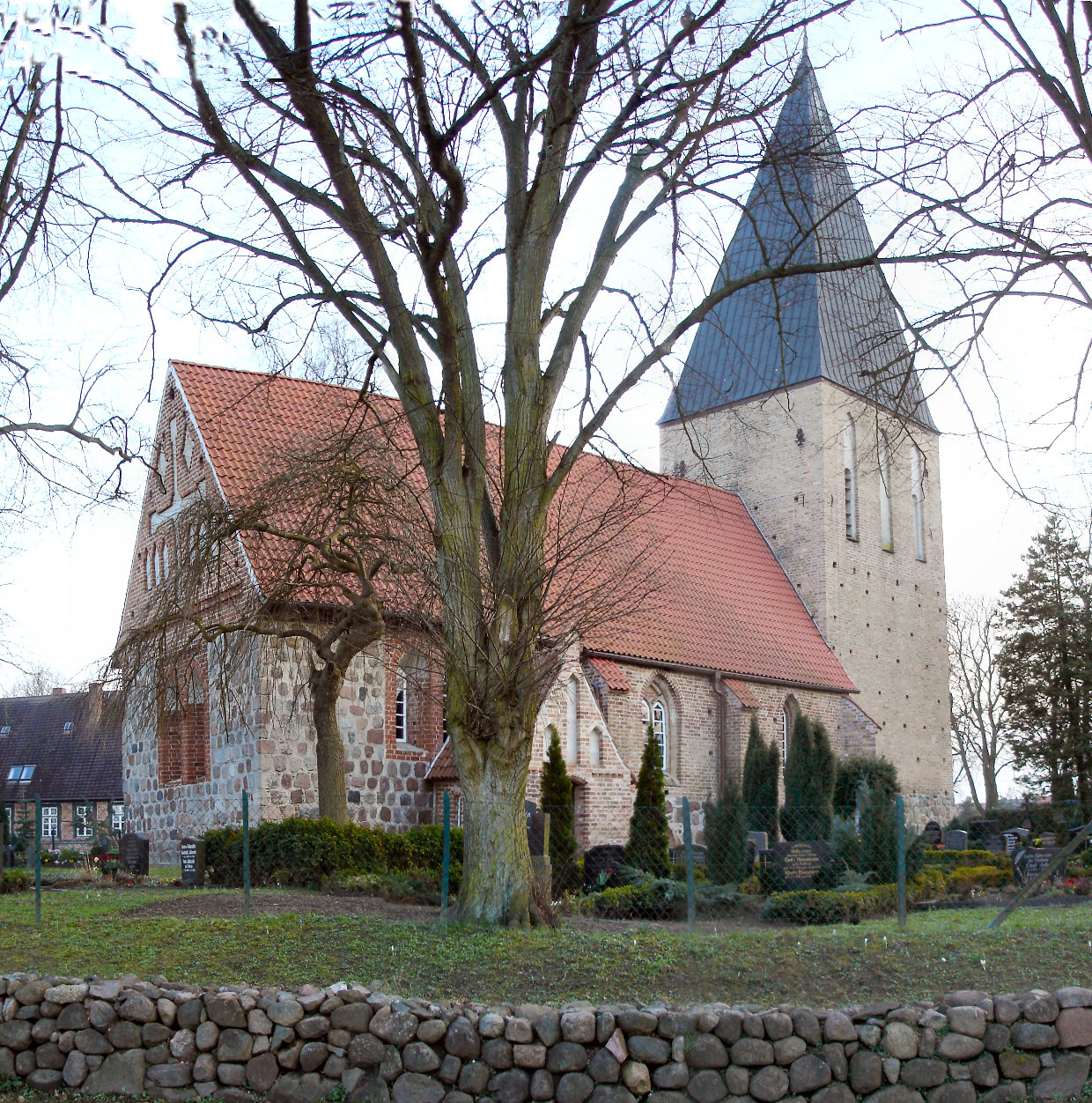 Kirche in Lambrechtshagen bei Rostock / Church in Lambrechtshagen near Rostock (Mecklenburg-Western Pomerania)